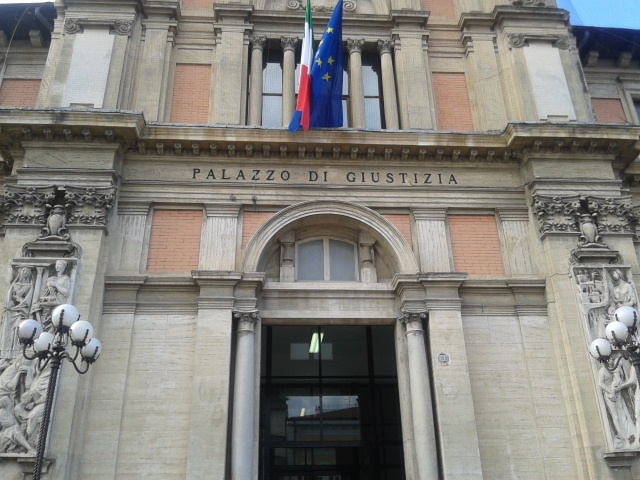 Facciata del palazzo di giustizia